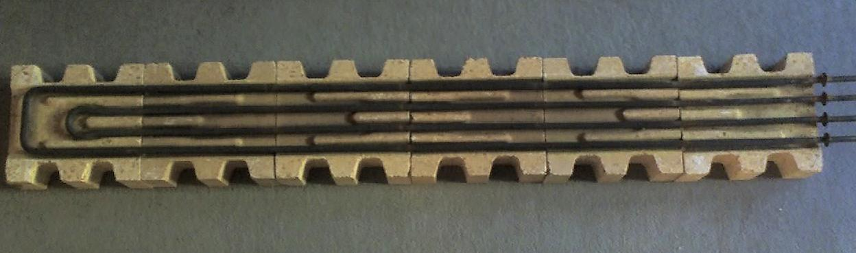 Heizstange einer Nachtspeicherheizung in Schamott-Formsteinen eingelegt.